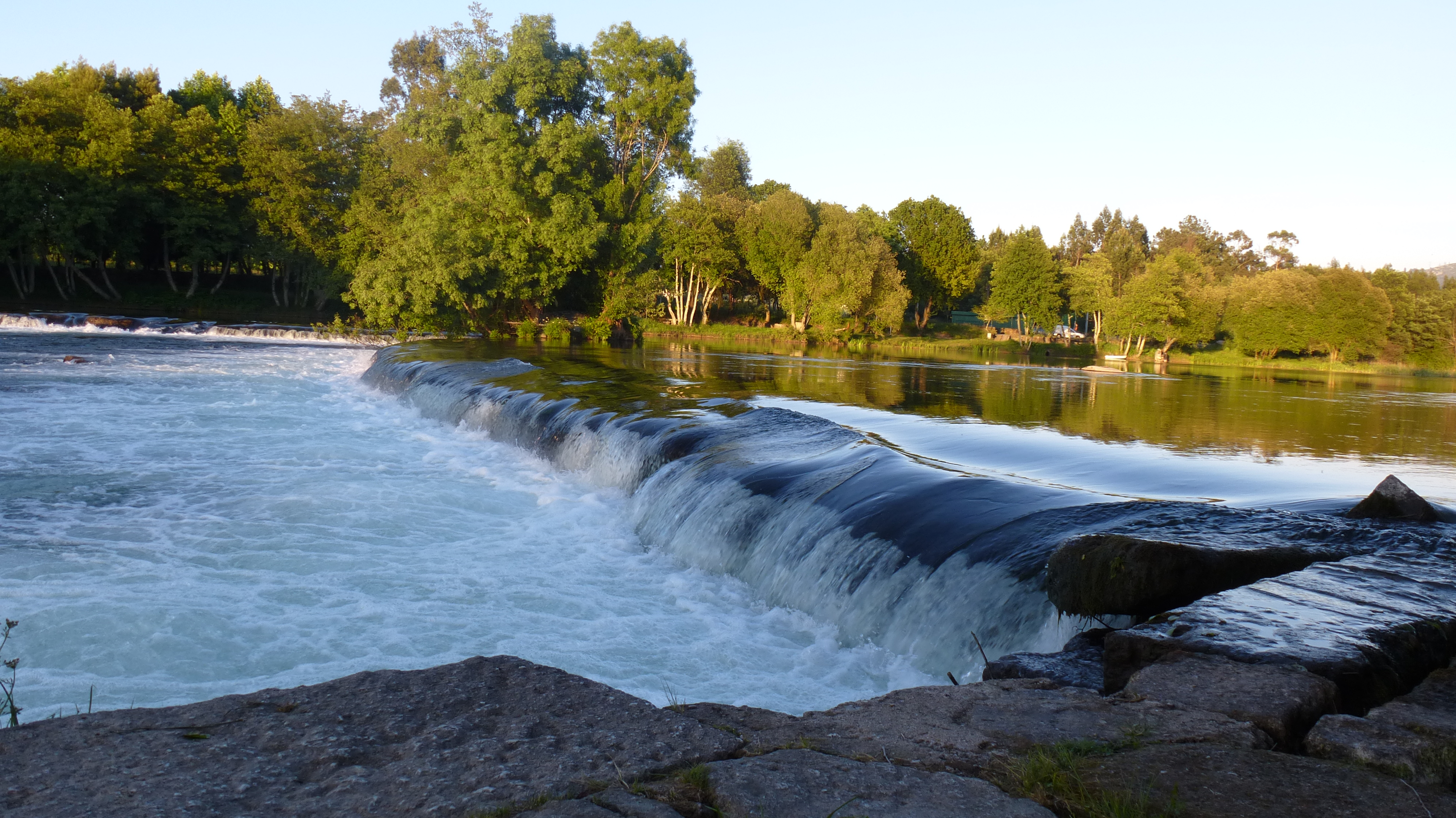 Cascata